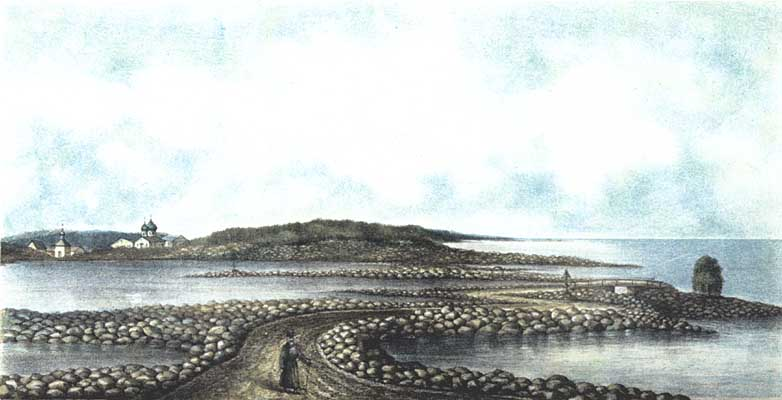 Каменный муксаломский мост через морской пролив.